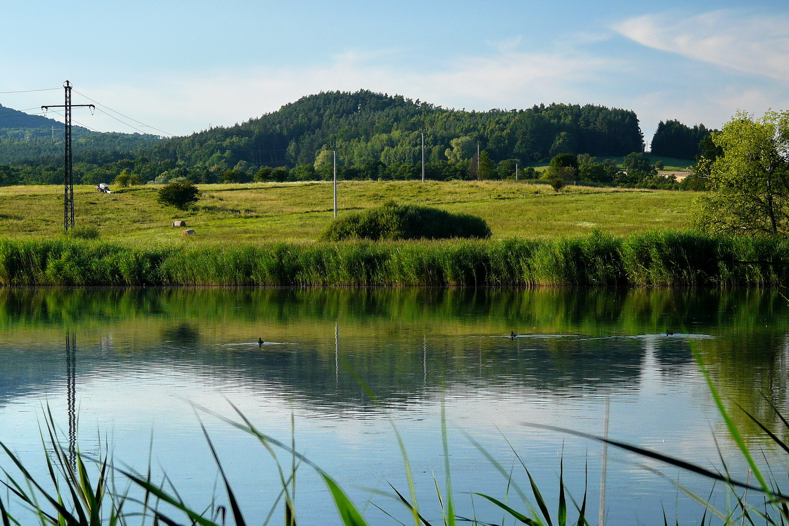 Skleněný vrch nad rybníkem Nohavice